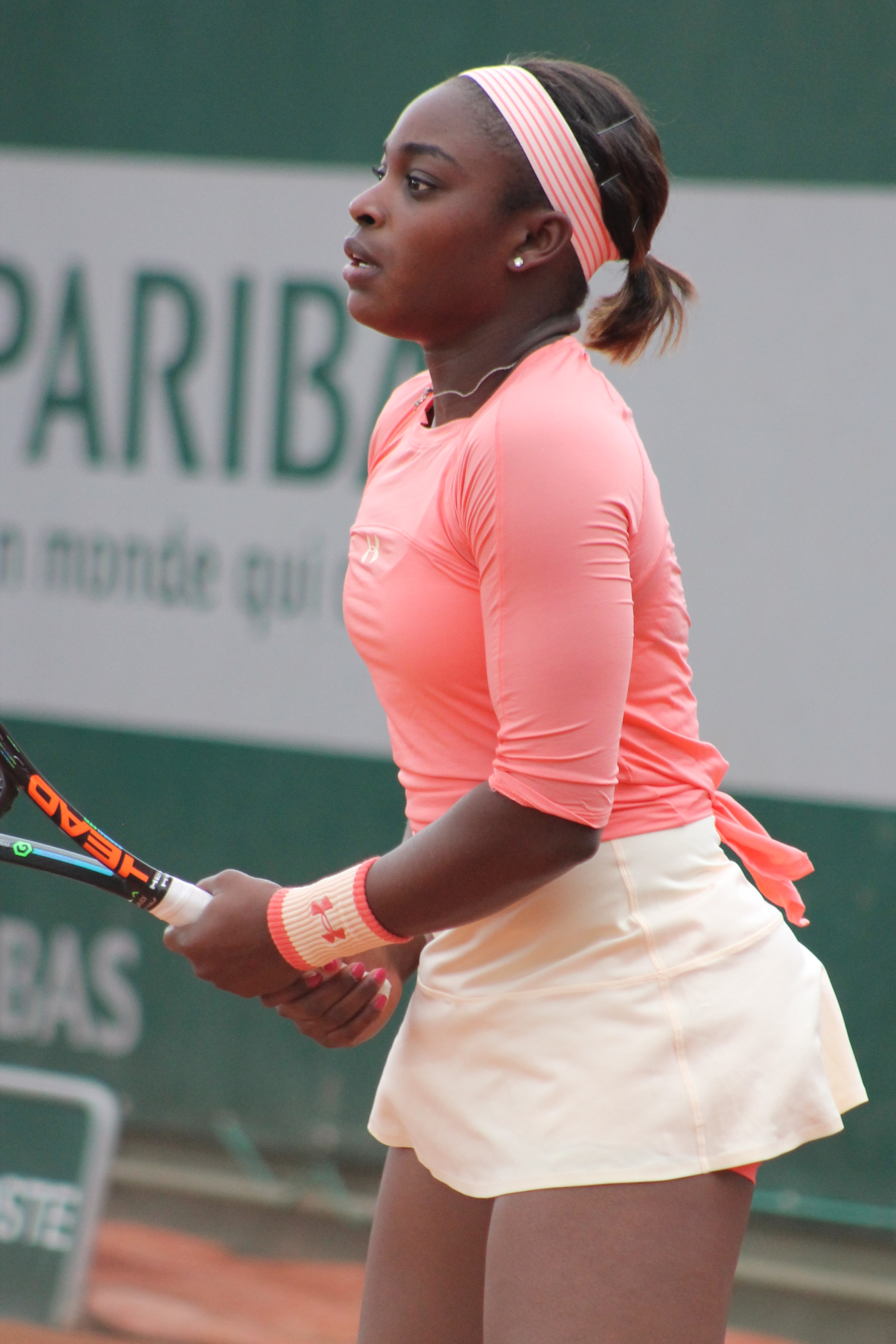 Stephens RG15 (15)